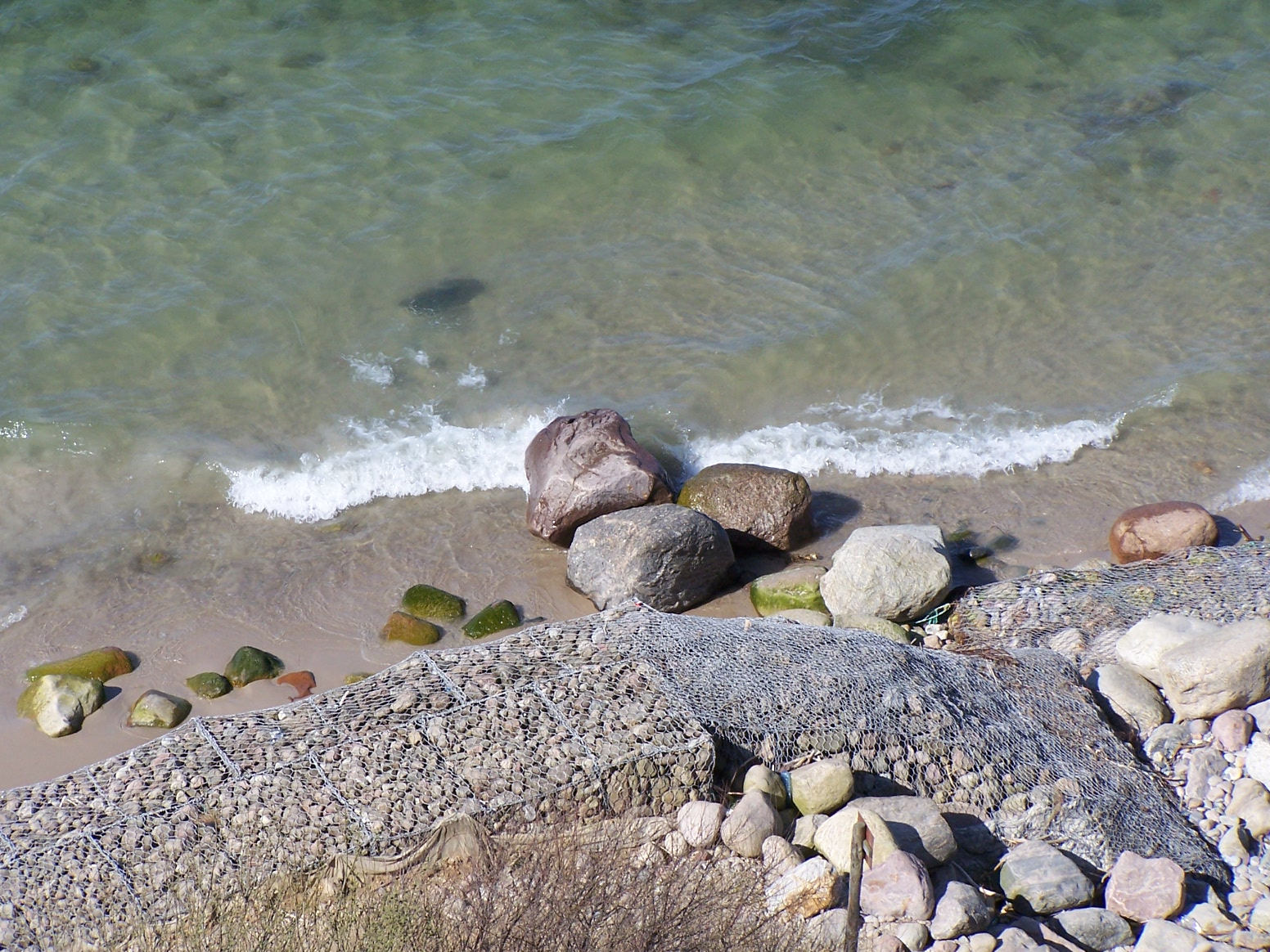 Faktyczny najdalszy punkt na północ